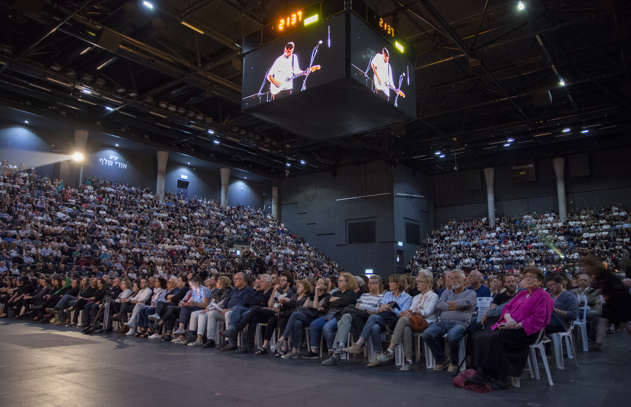 הטקס שהתקיים בשנת 2017 - מבט על הקהל